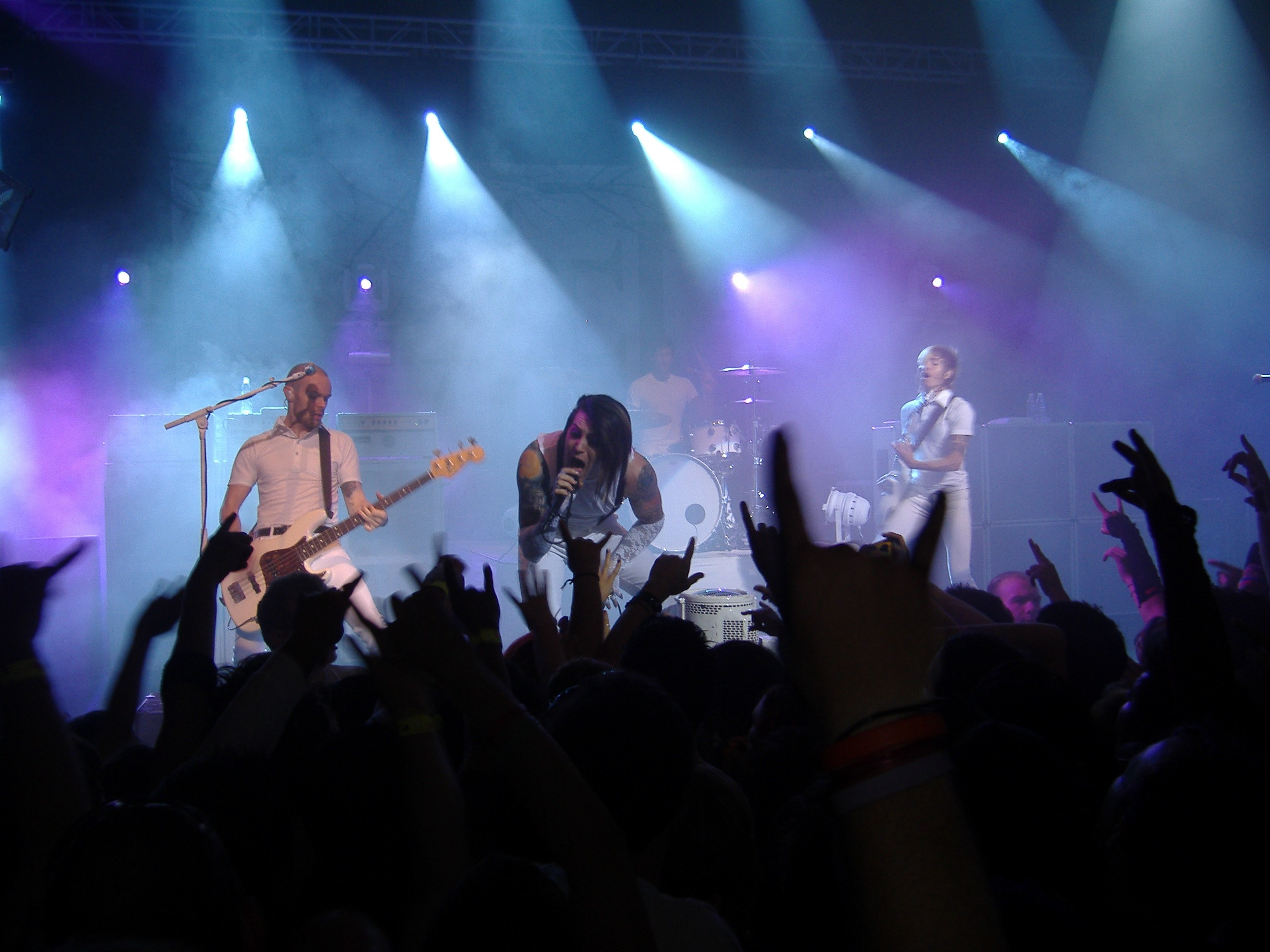 AFI in concert